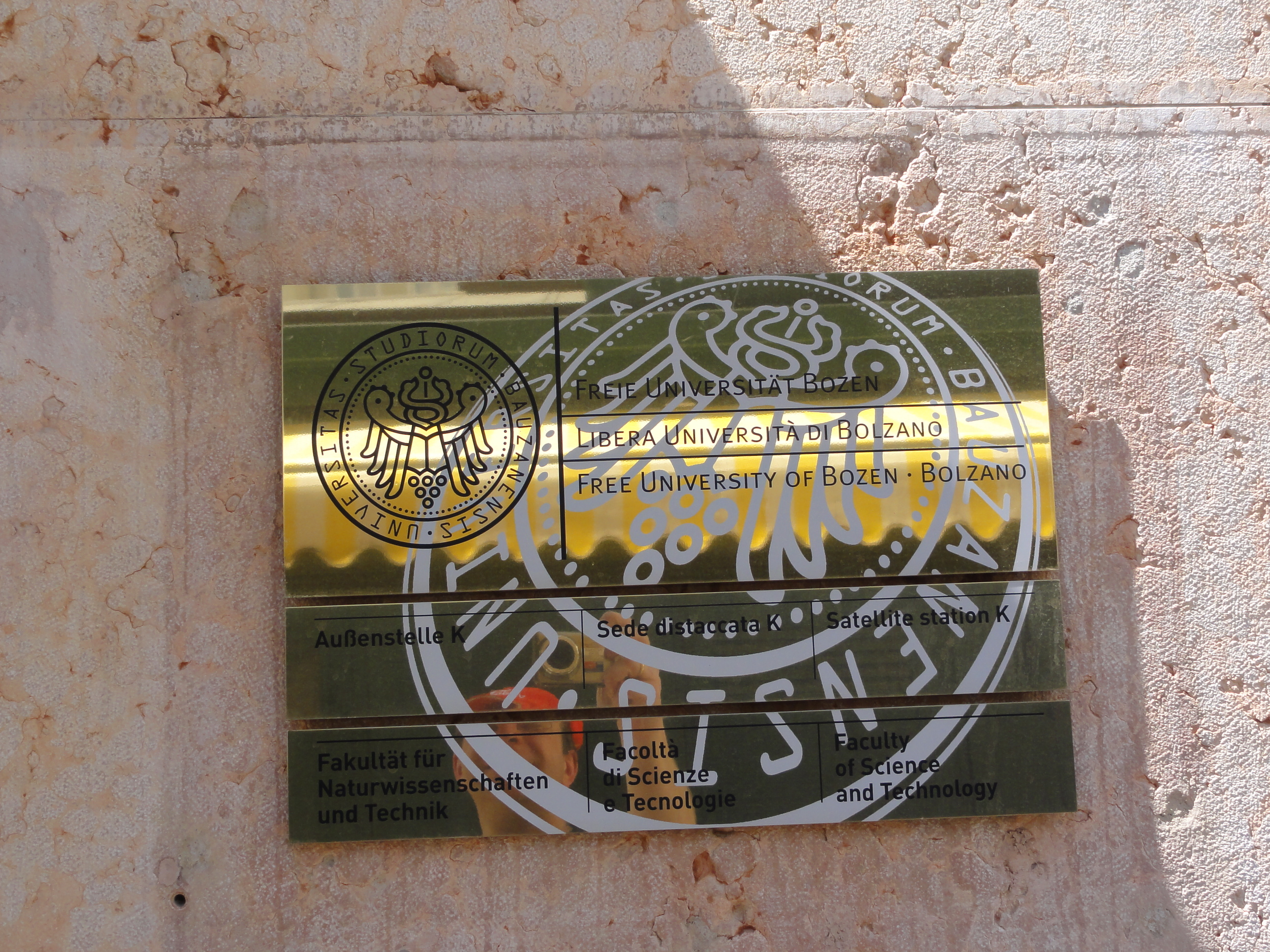 Bozen-Bolzano — Freie Universität Bozen - Libera Università di Bolzano (Schild)